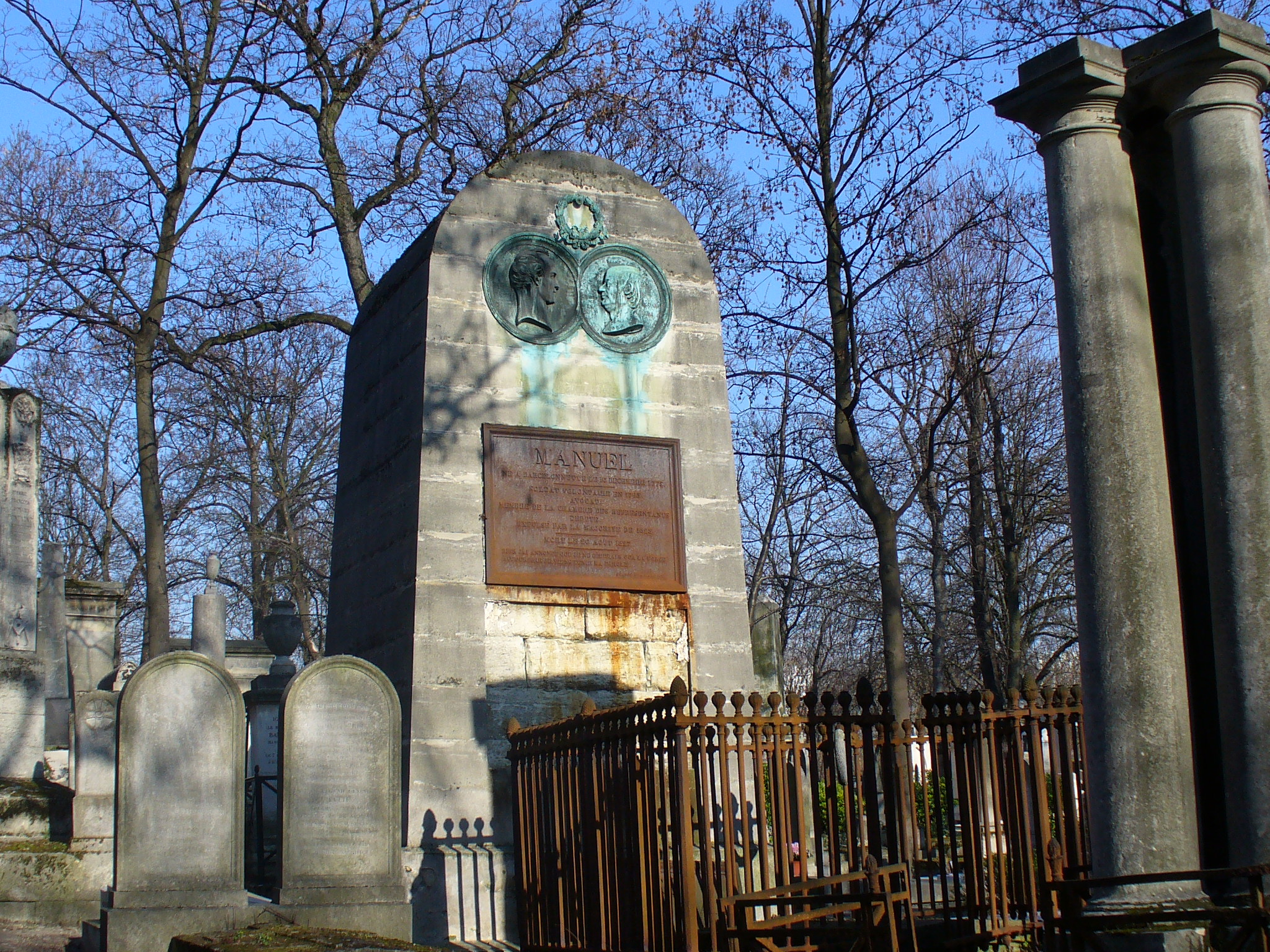 Tombe de Manuel et Béranger au cimetière Lachaise (Paris)